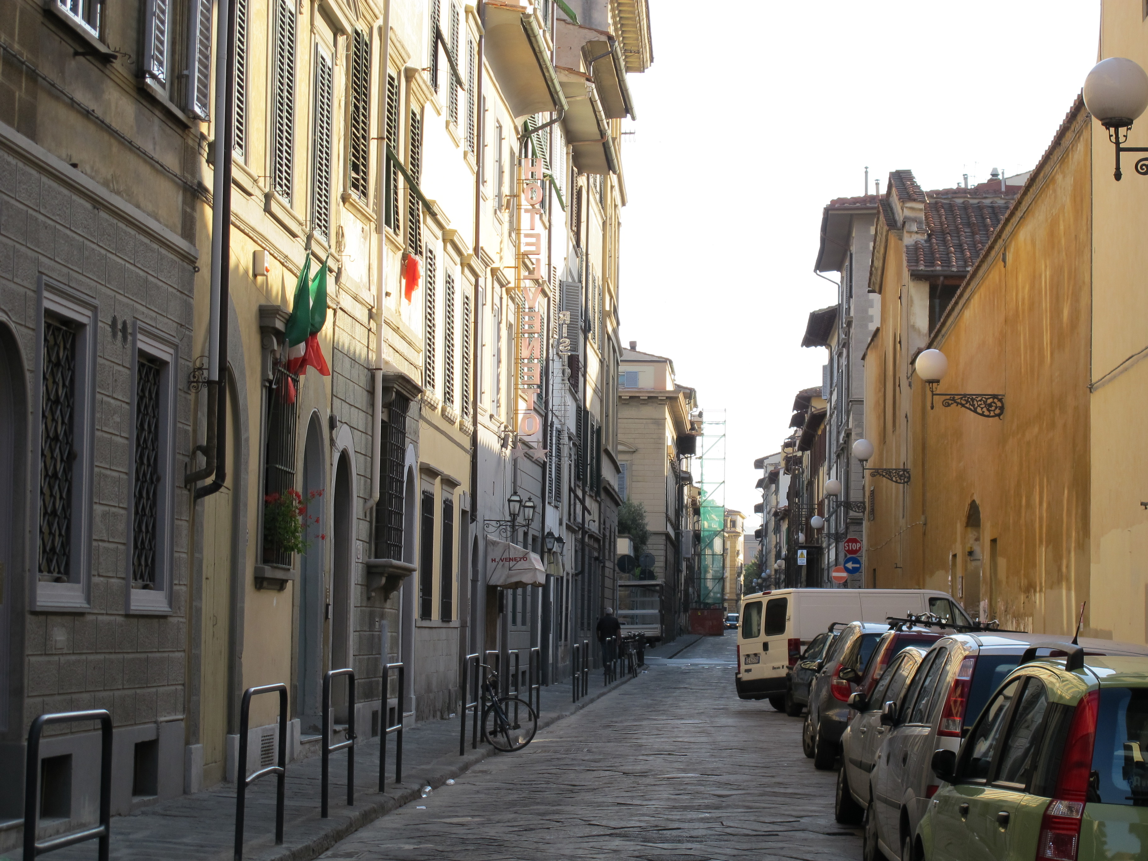 Via santa reparata